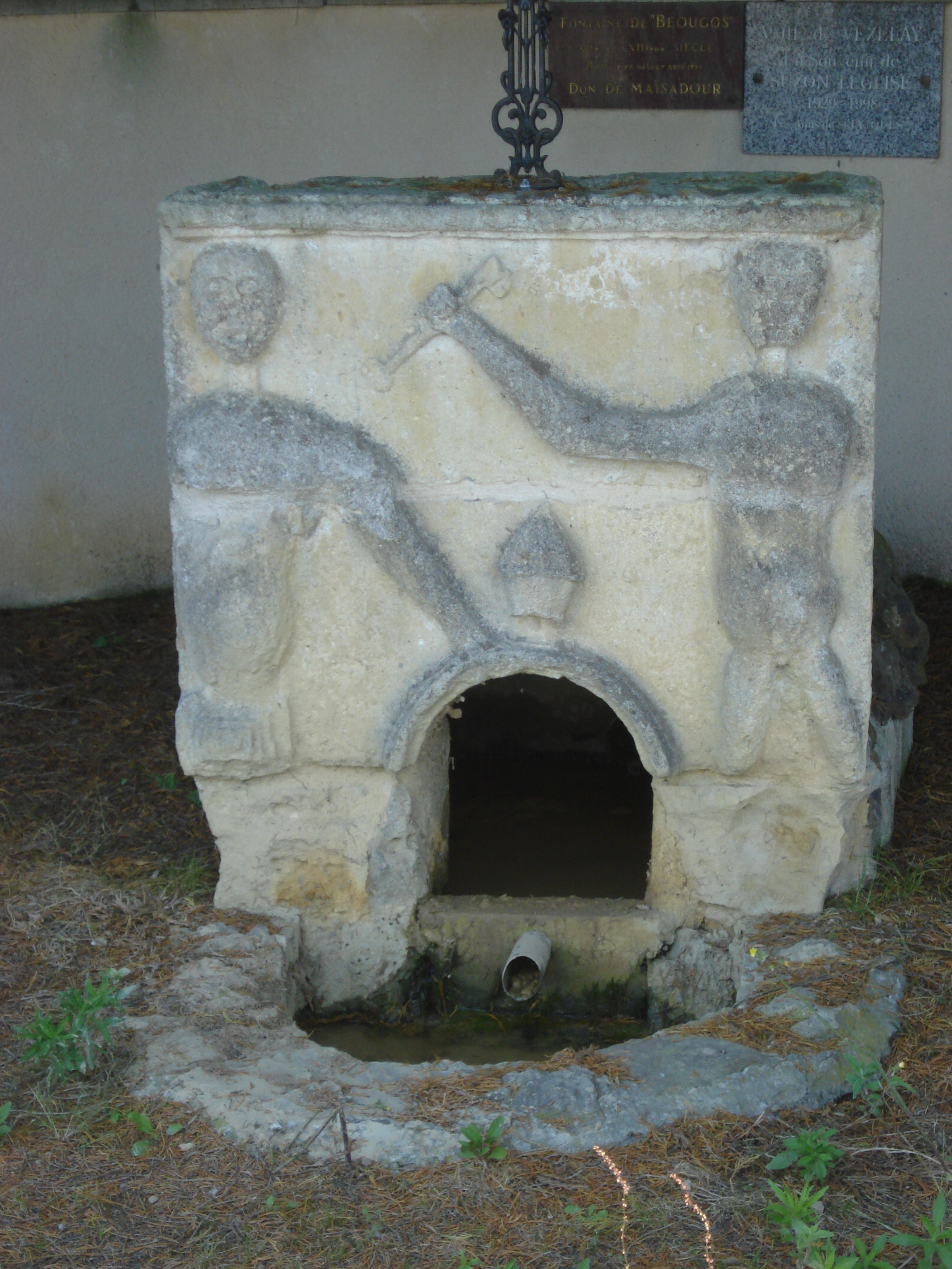 Labastide-Chalosse (Landes, Fr) fontaine romane on the Way of Saint James (Via Lemovicensis).